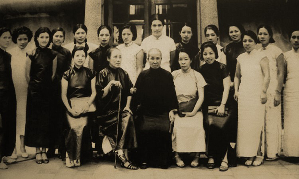 中文（台灣）: 〈游擊隊之母趙老太太赴港募捐抗日〉，1938年